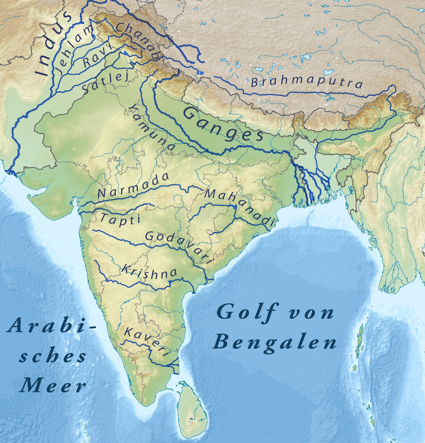 Karte Indiens mit den wichtigsten Flüssen erstellt auf der Grundlage von